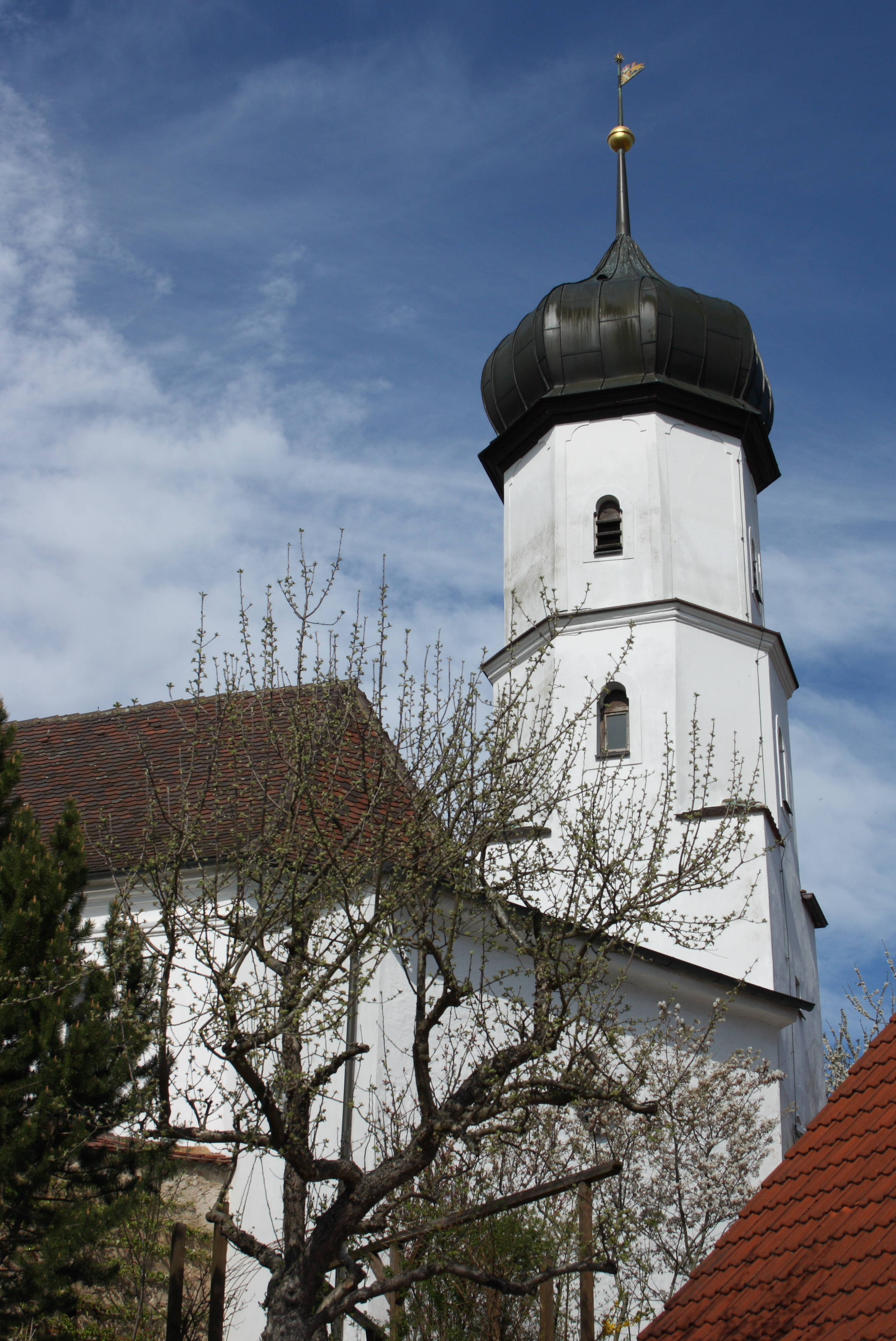 Schloss Hirschbrunn, ehemaliges Jagdschloss in Dornstadt, einem Ortsteil von Auhausen im Landkreis Donau-Ries (Bayern), Hirschbrunner Straße 20, erbaut 1626, Katholische Schlosskapelle St. Maria, erbaut 1692